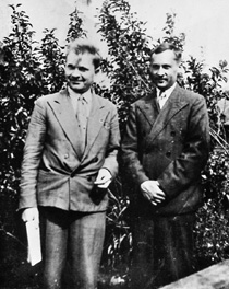 Последний прижизненный снимок П. Головача. Cделан в августе 1937 года, в Копыси. Писатель в кадре вместе с братом жены, Алесем Вечером